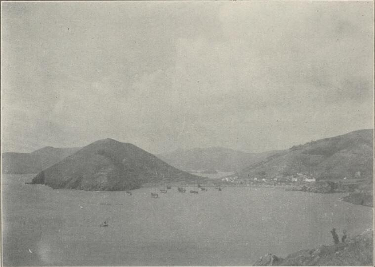 玉環花岩礁，表示沉淹海岸之幼期侵蝕